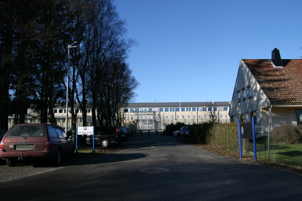 Stavanger_fengsel